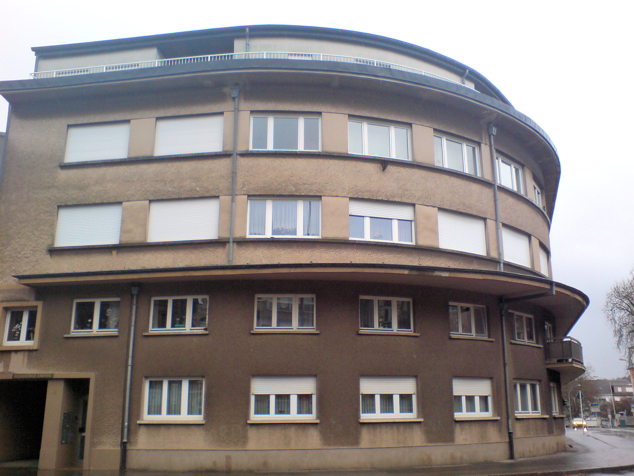 sujet: fréiere Kino Empire zu Esch.